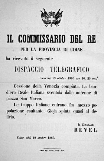 Manifesto con testo del telegramma del generale Revel inviato a Udine